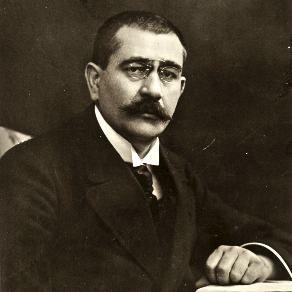 Gustav Noske (1868–1946), Minister während der Weimarer Republik